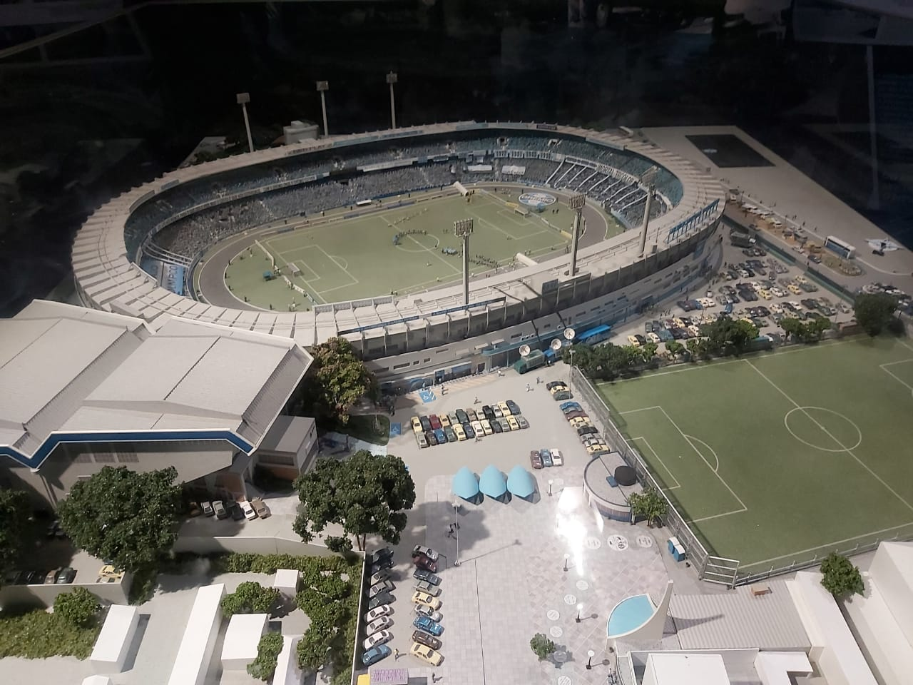 Maquete